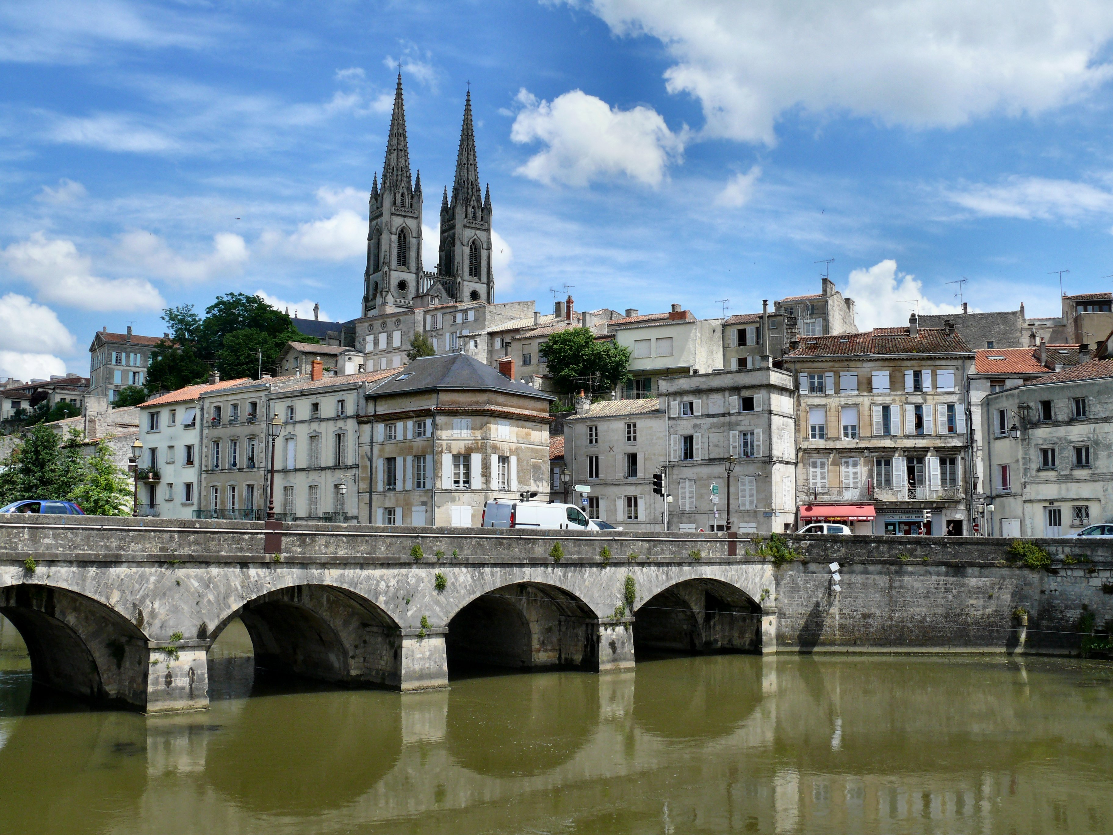 A view of Niort from the Sevre Niortaise river, Deux-Sevres, Poitou-Charentes region, France, May 2008 Une vue de Niort depuis la Sèvre Niortaise. Niort, Deux-Sèvres, région Poitou-Charentes, France, Mai 2008